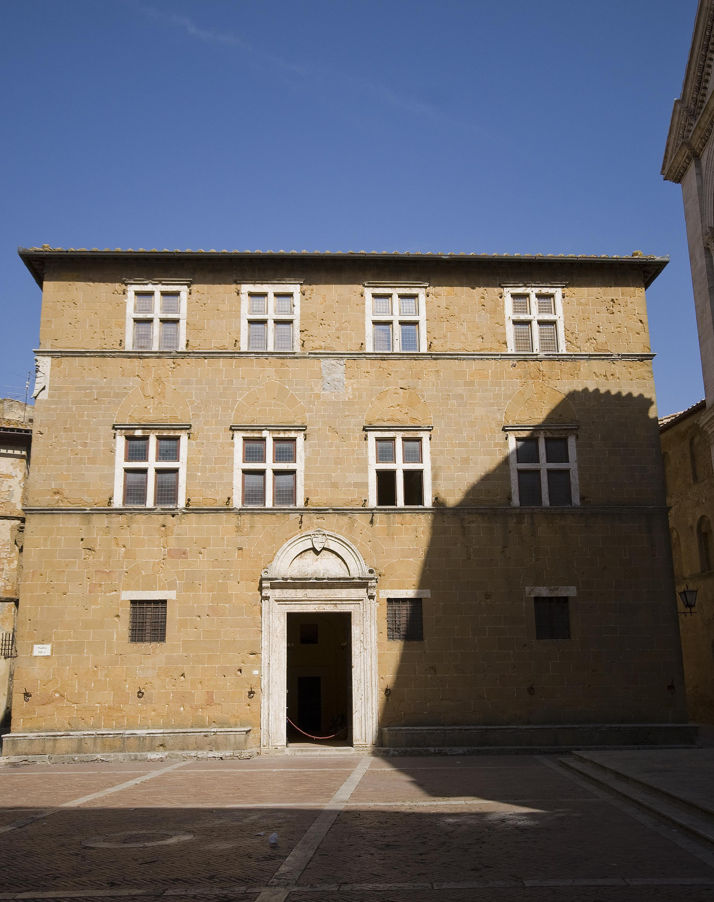 Palazzo borgia o palazzo vescovile - Pienza